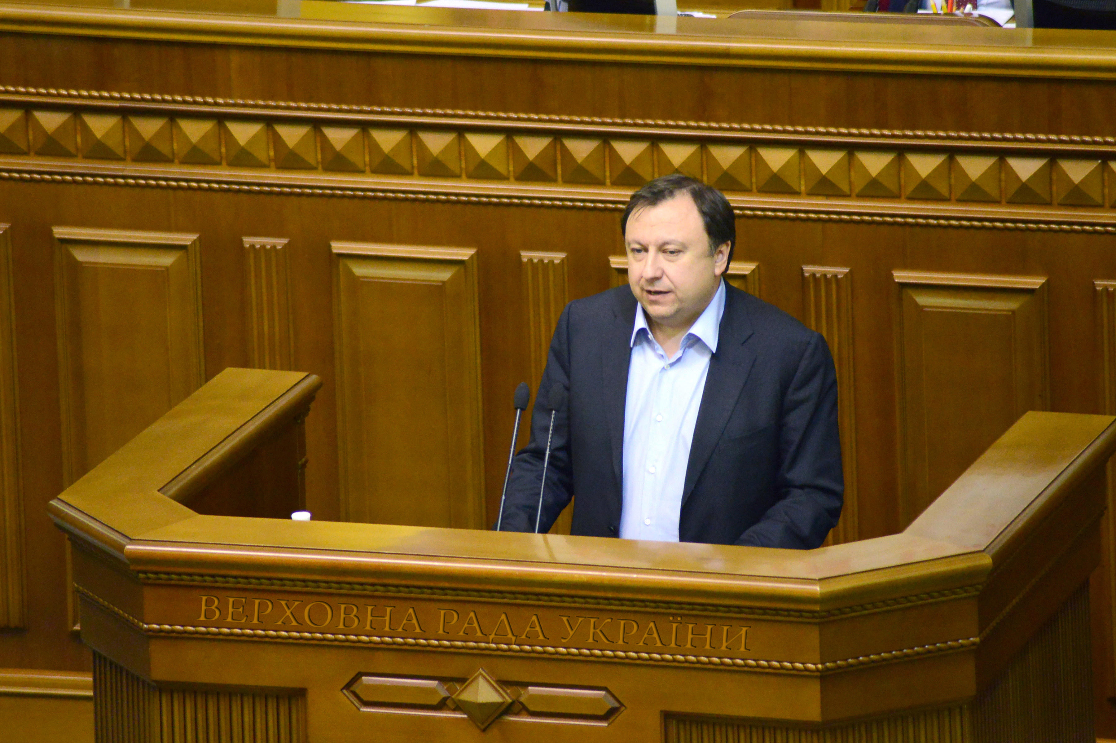 ВЕРХОВНА РАДА УКРАЇНИ 2015 фотограф Вадим Чуприна